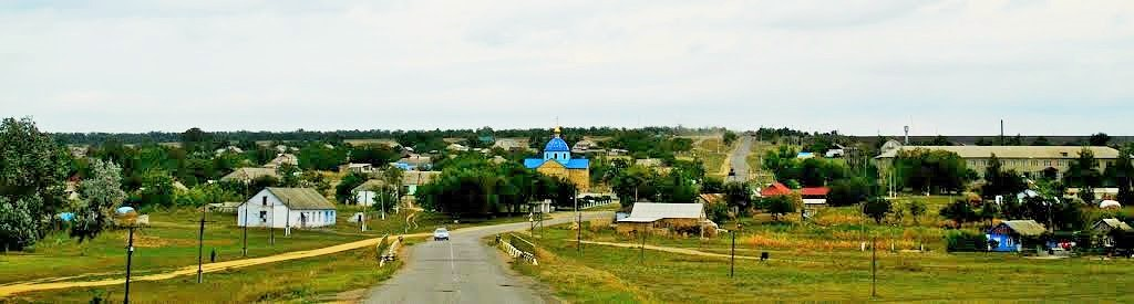 Новоукраинка